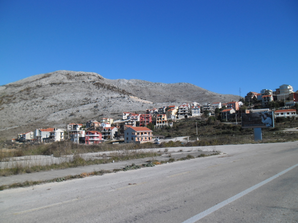 naselje Ivanica